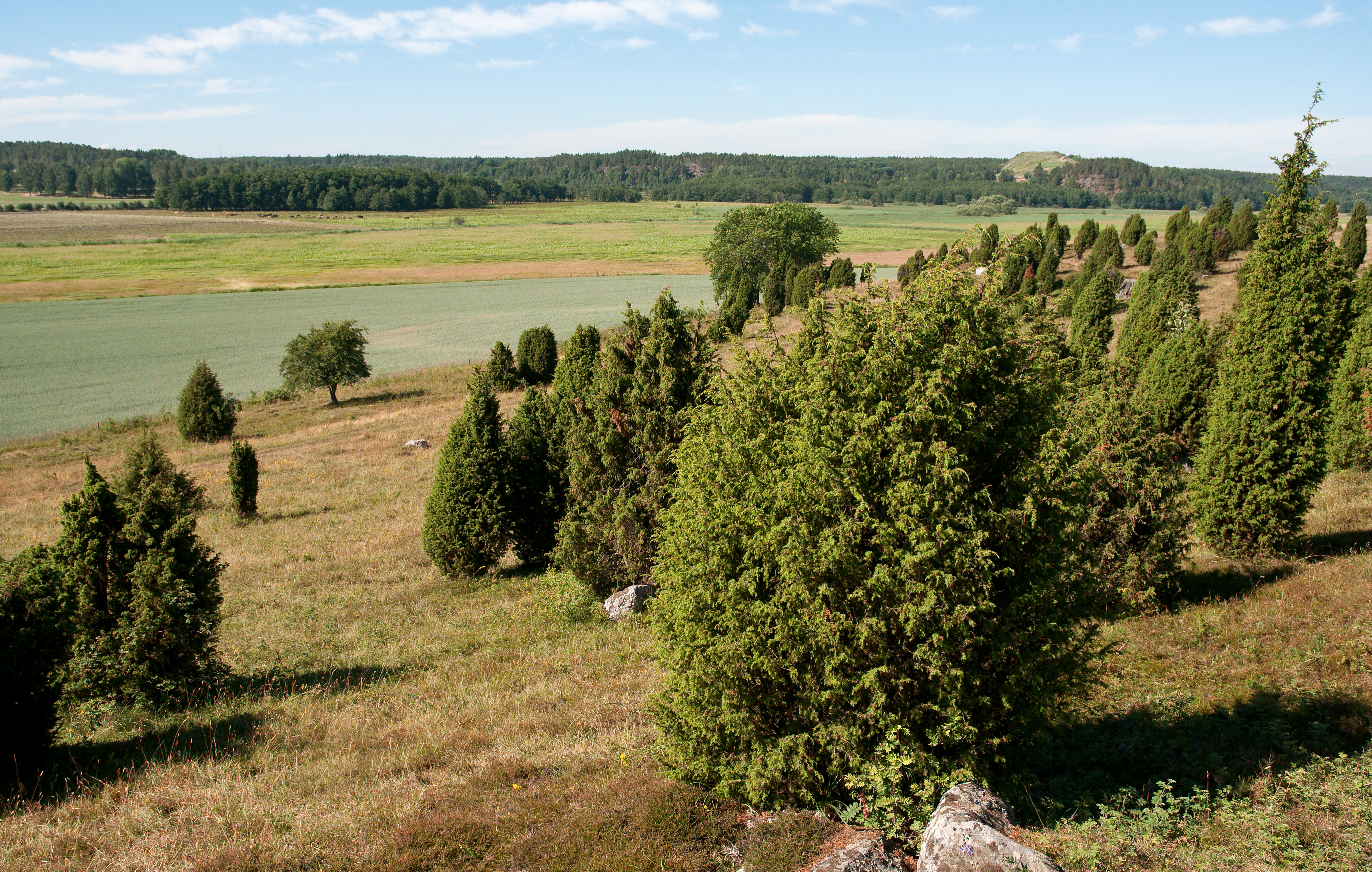 Lindbacke-Svanvikens naturreservat i Nyköping.